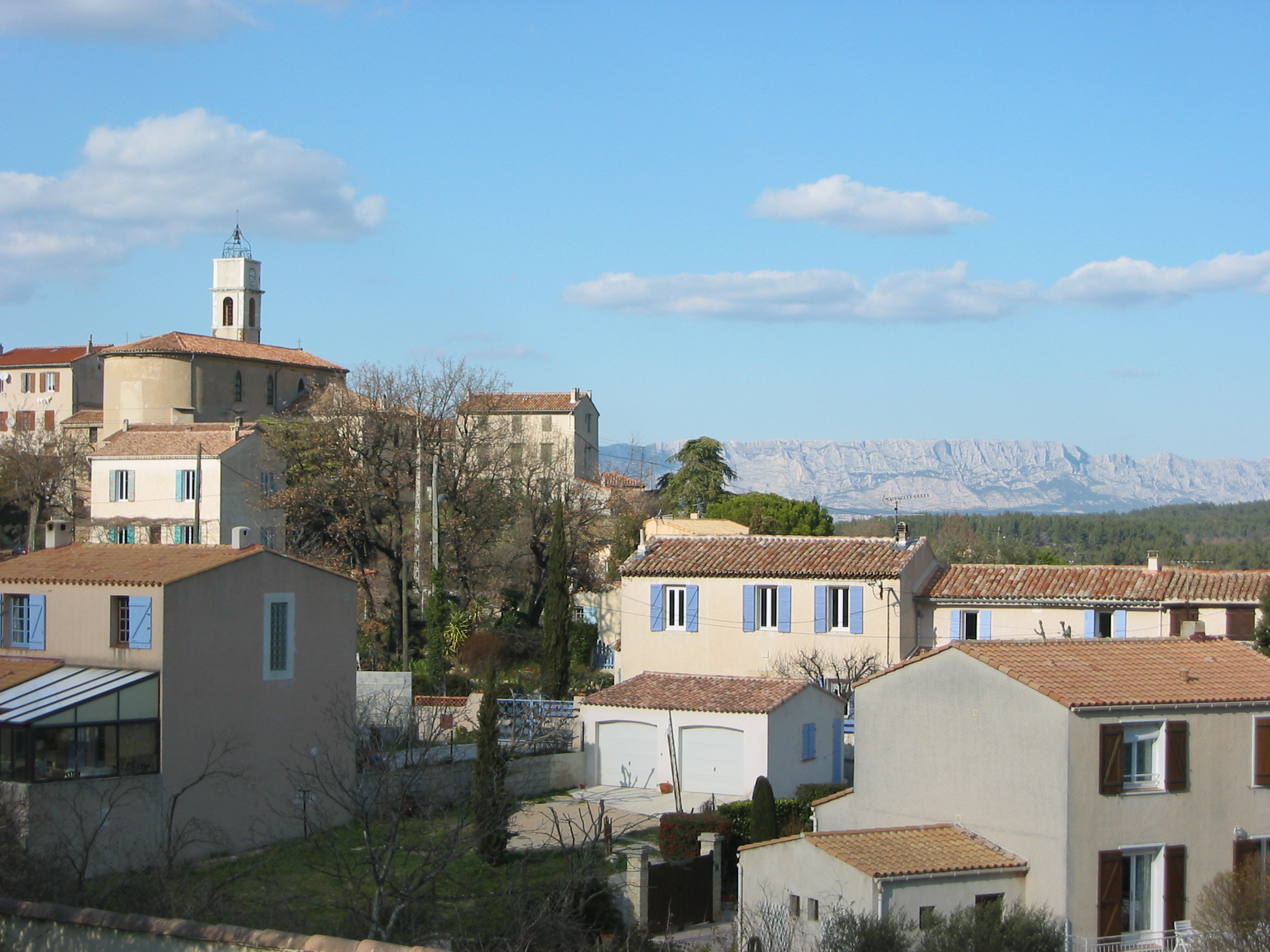 Cadolive, Bouches-du-Rhône, France. Photo prise depuis la D7, Ã l'entrée est du village, côté Peypin. Photo prise le 1er mars 2006. Auteur : Ludovic Ruat (utilisateur:civodule)